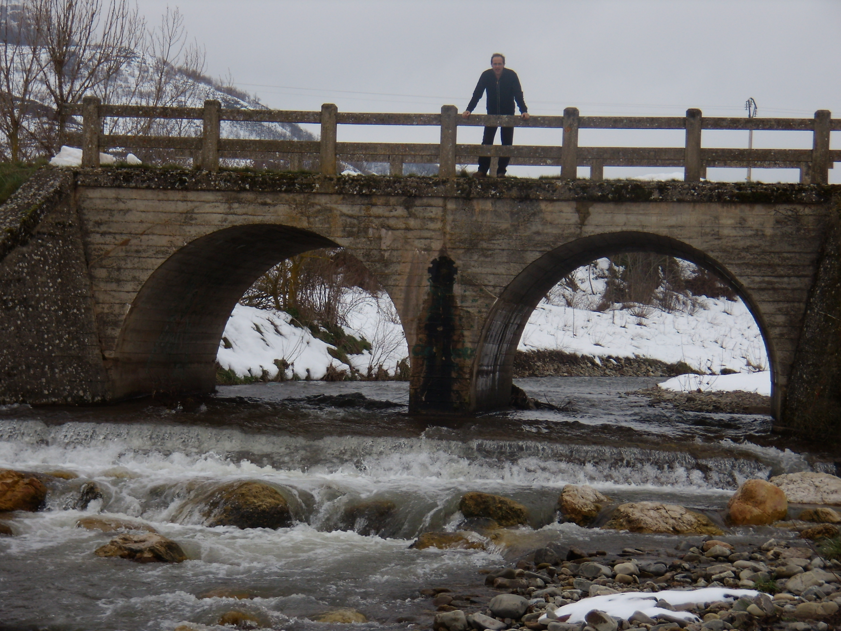 el rio Tirón a su paso por Espinosa del Monte durante la gran nevada de Burgos